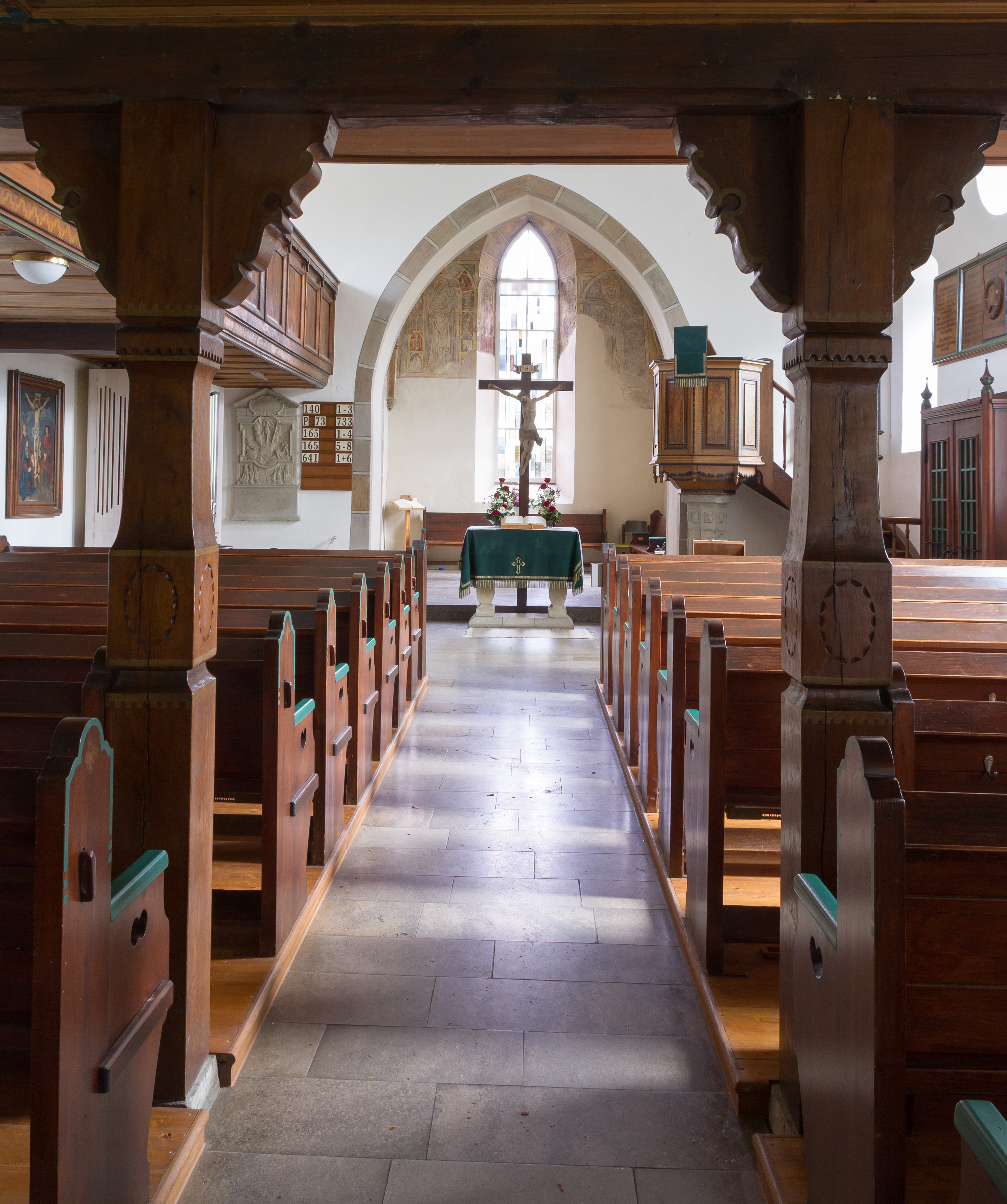 Innenraum der Kirche Bächlingen